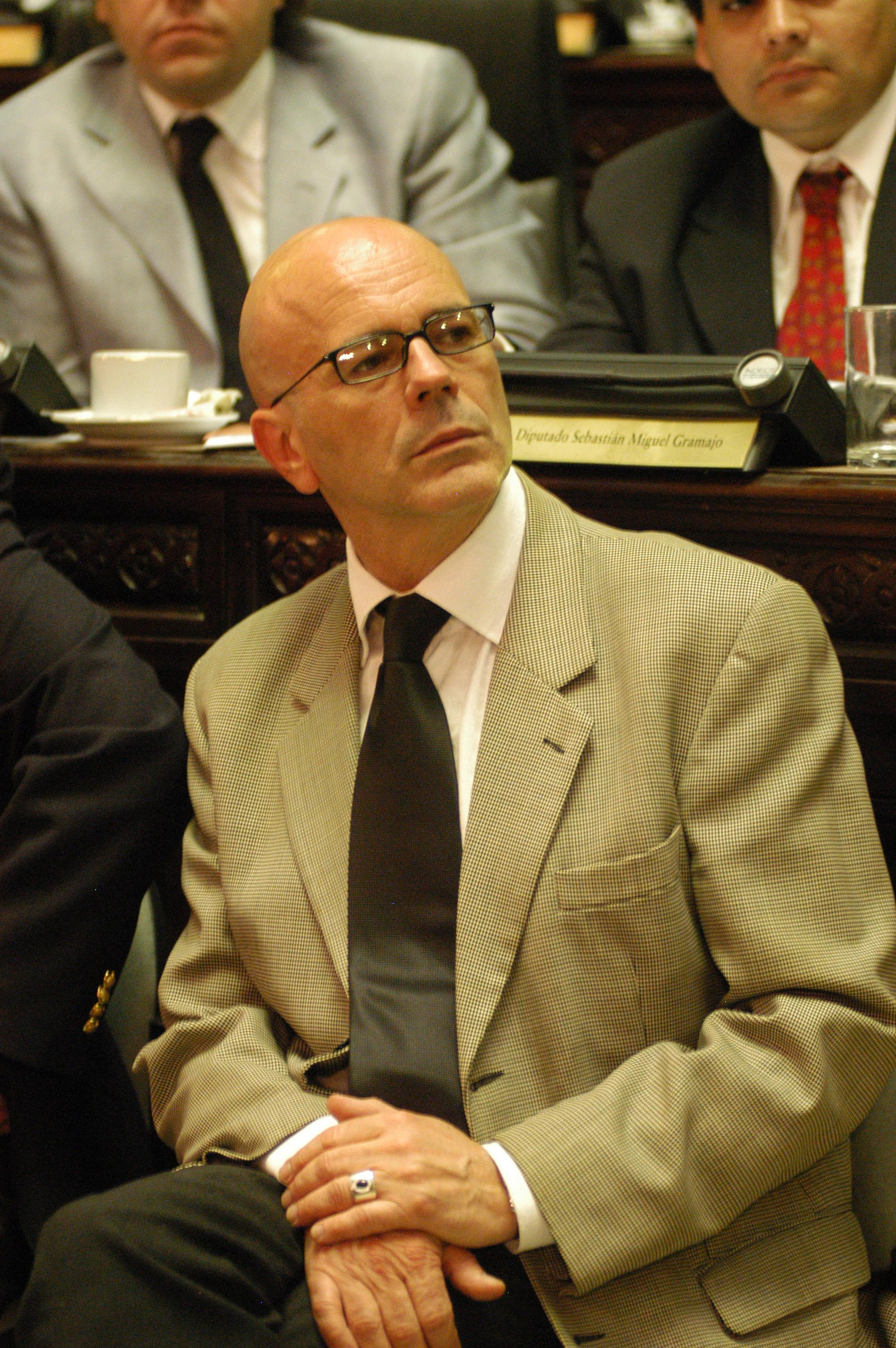 Jorge Telerman en la Legislatura Porteña